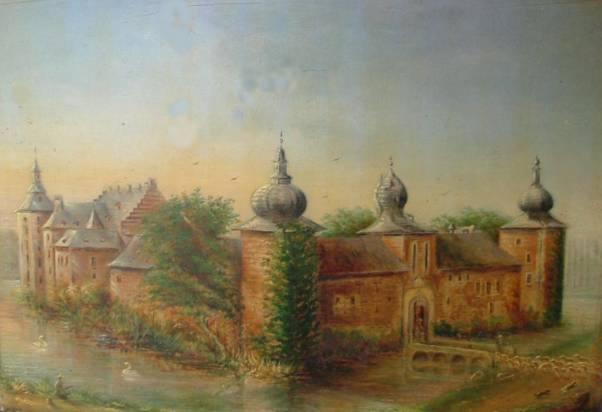 Gemälde des Schlosses Schaesberg